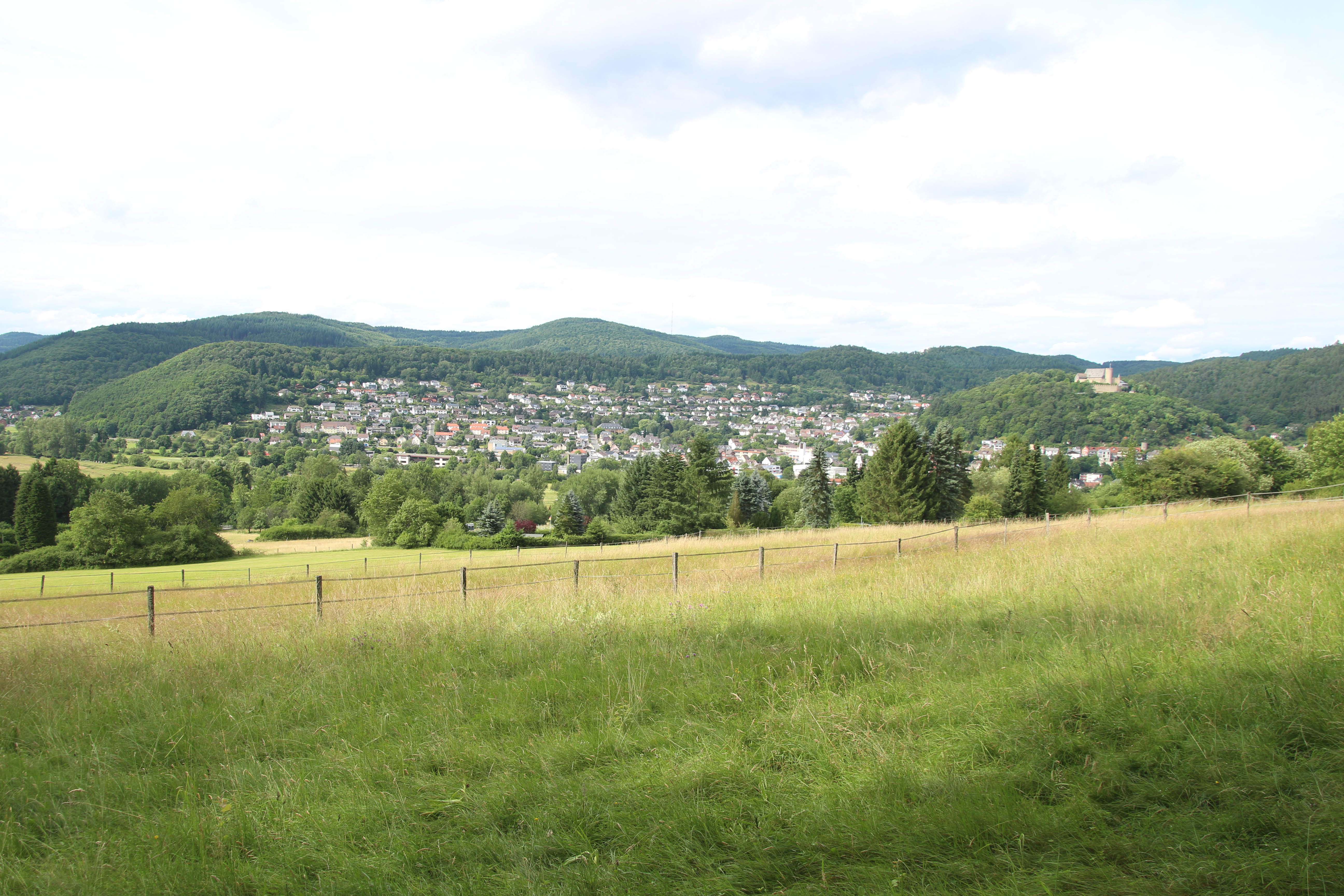 Siehe Bild und Dateiname